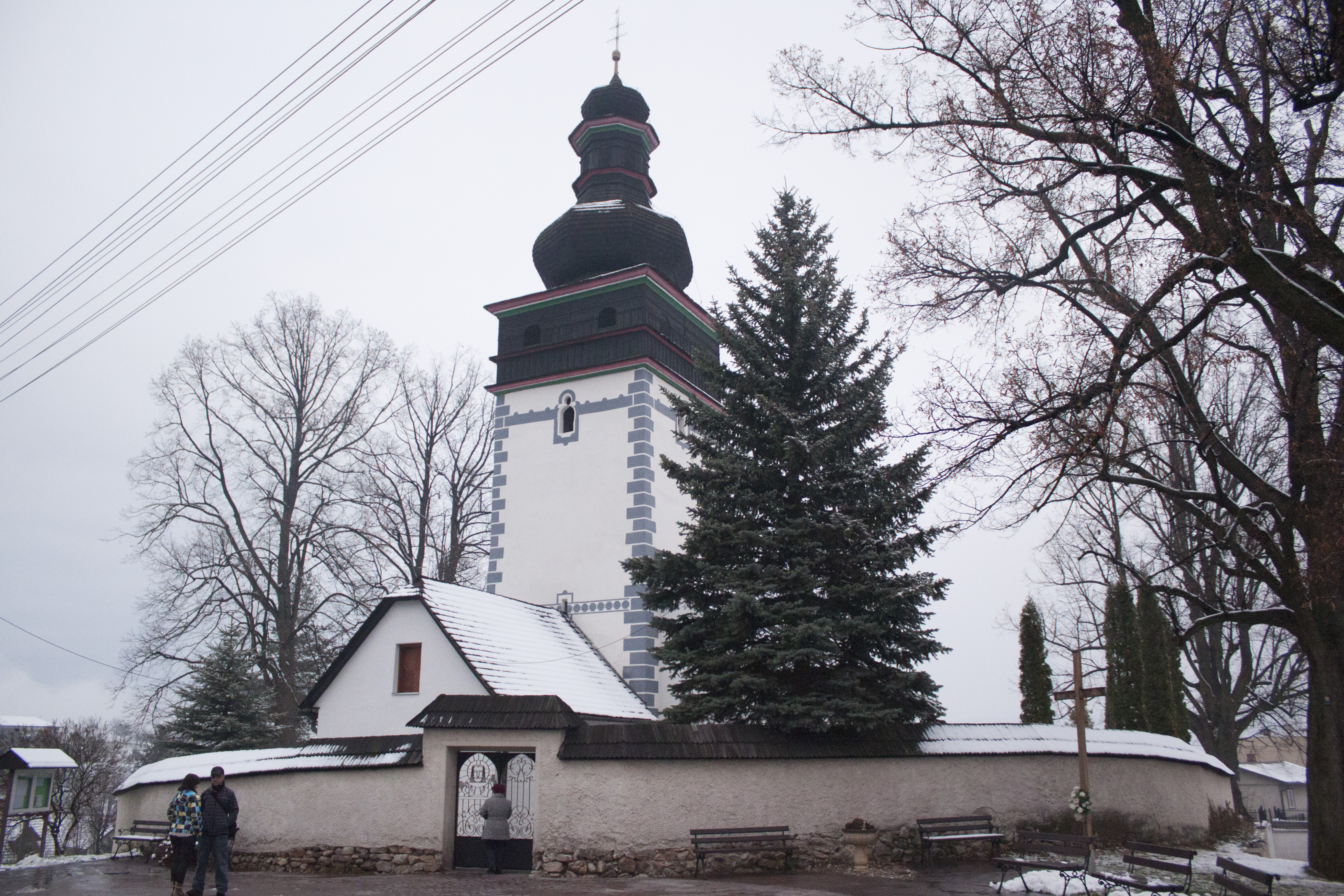 Kostol